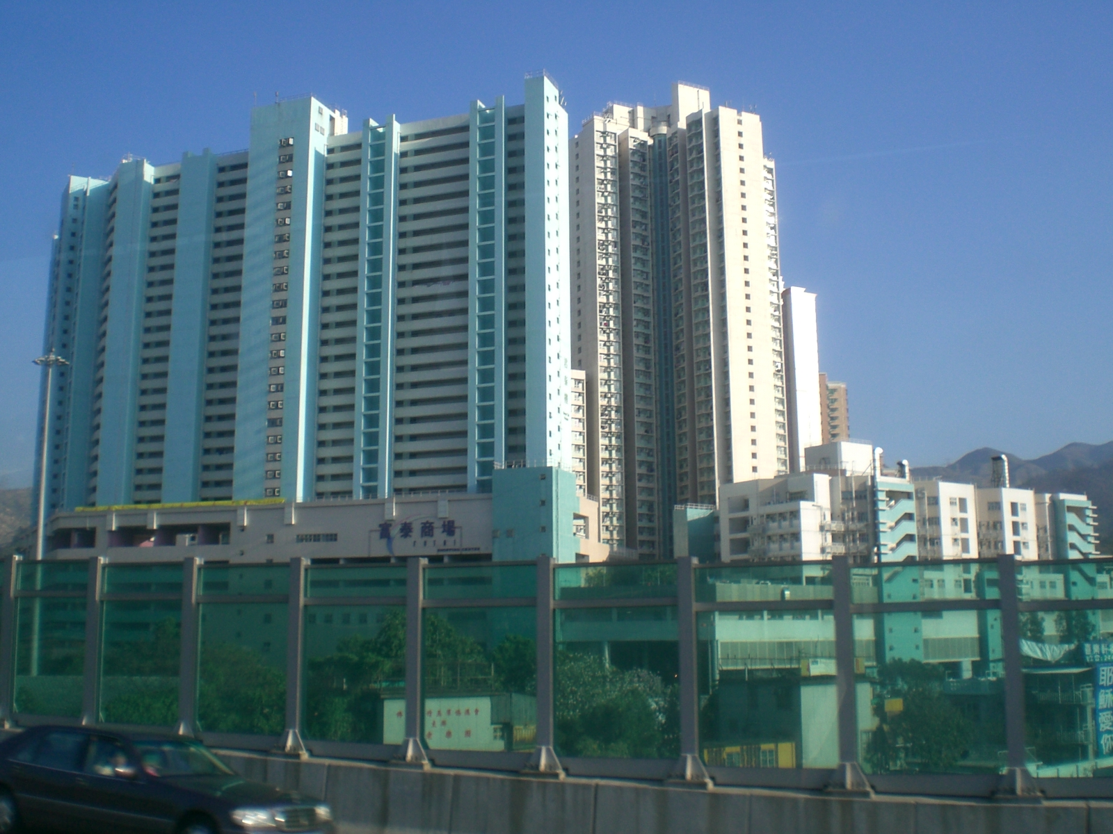 香港公共房屋屯門虎地富泰邨富泰商場